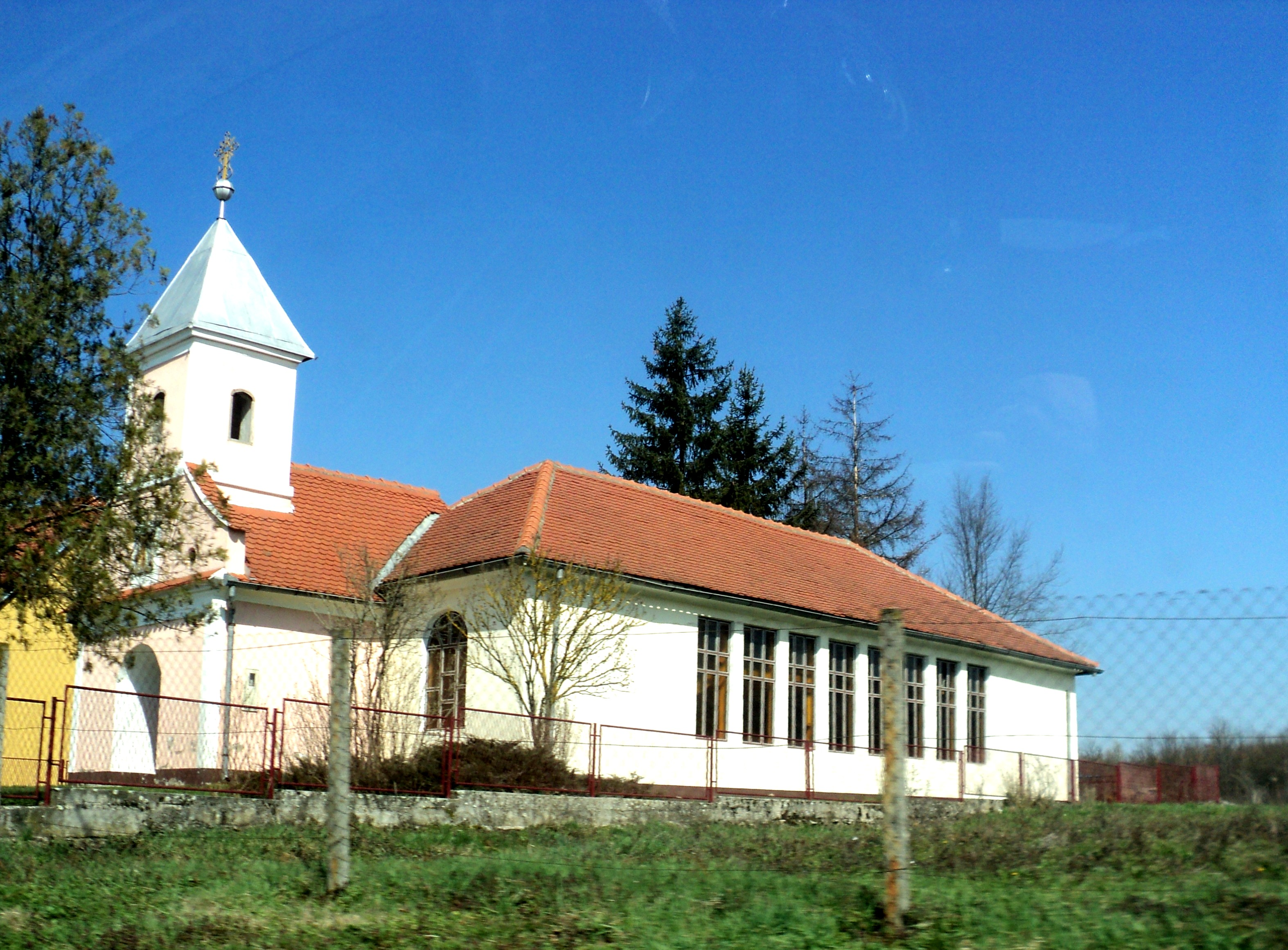 Kadanovci kod Pleternice